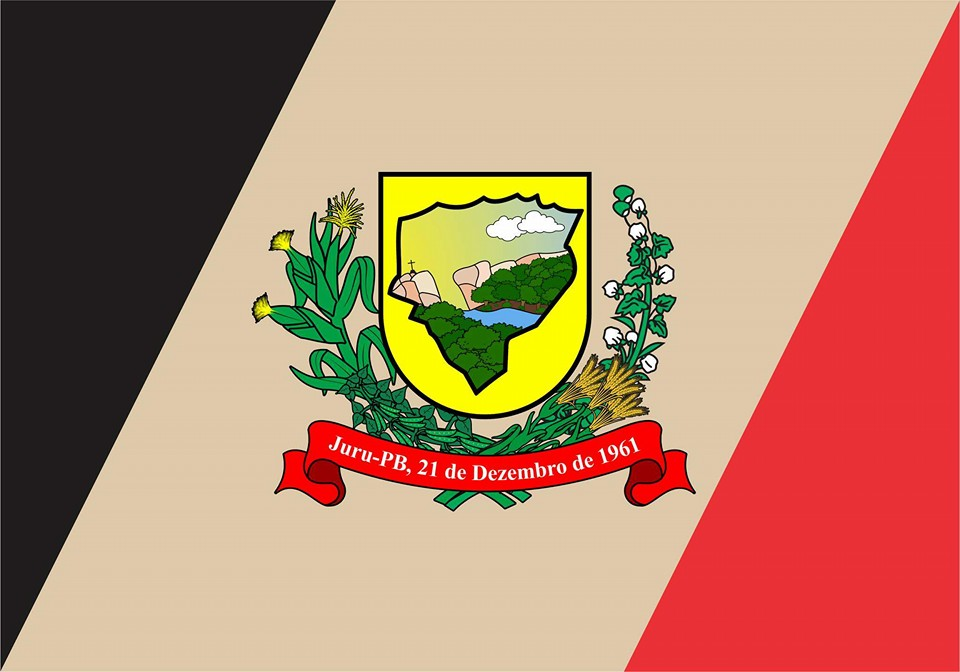 Brasão de Armas do Município de Juru no Estado da Paraíba, Brasil.